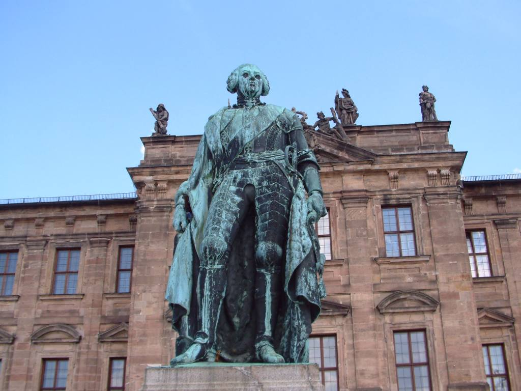 Schlossplatz Erlangen Skulptur